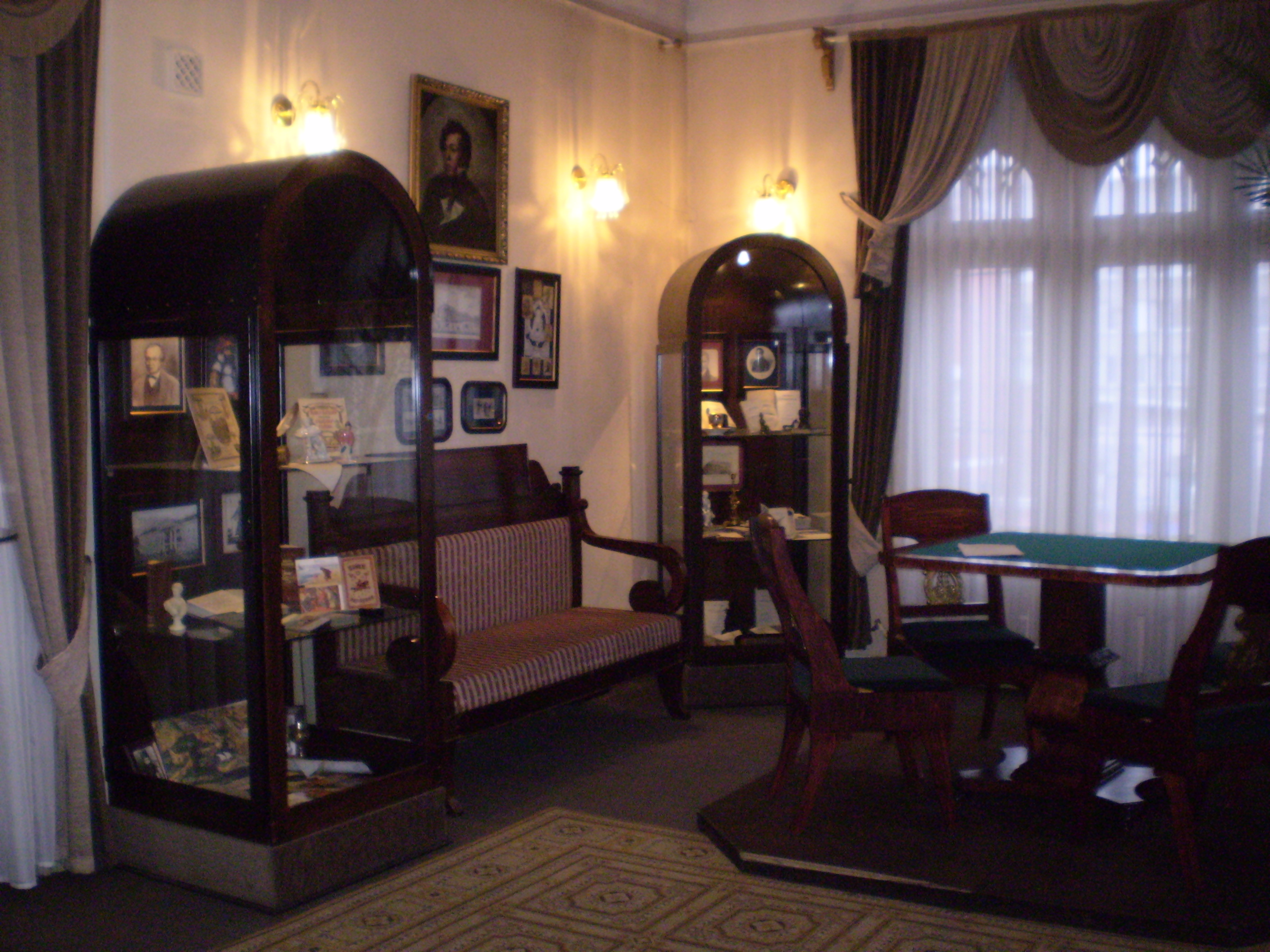 Литературный музей. Интерьер.